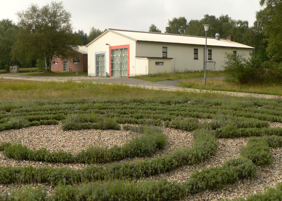 Lavendellabyrinth im Camp Reinsehlen